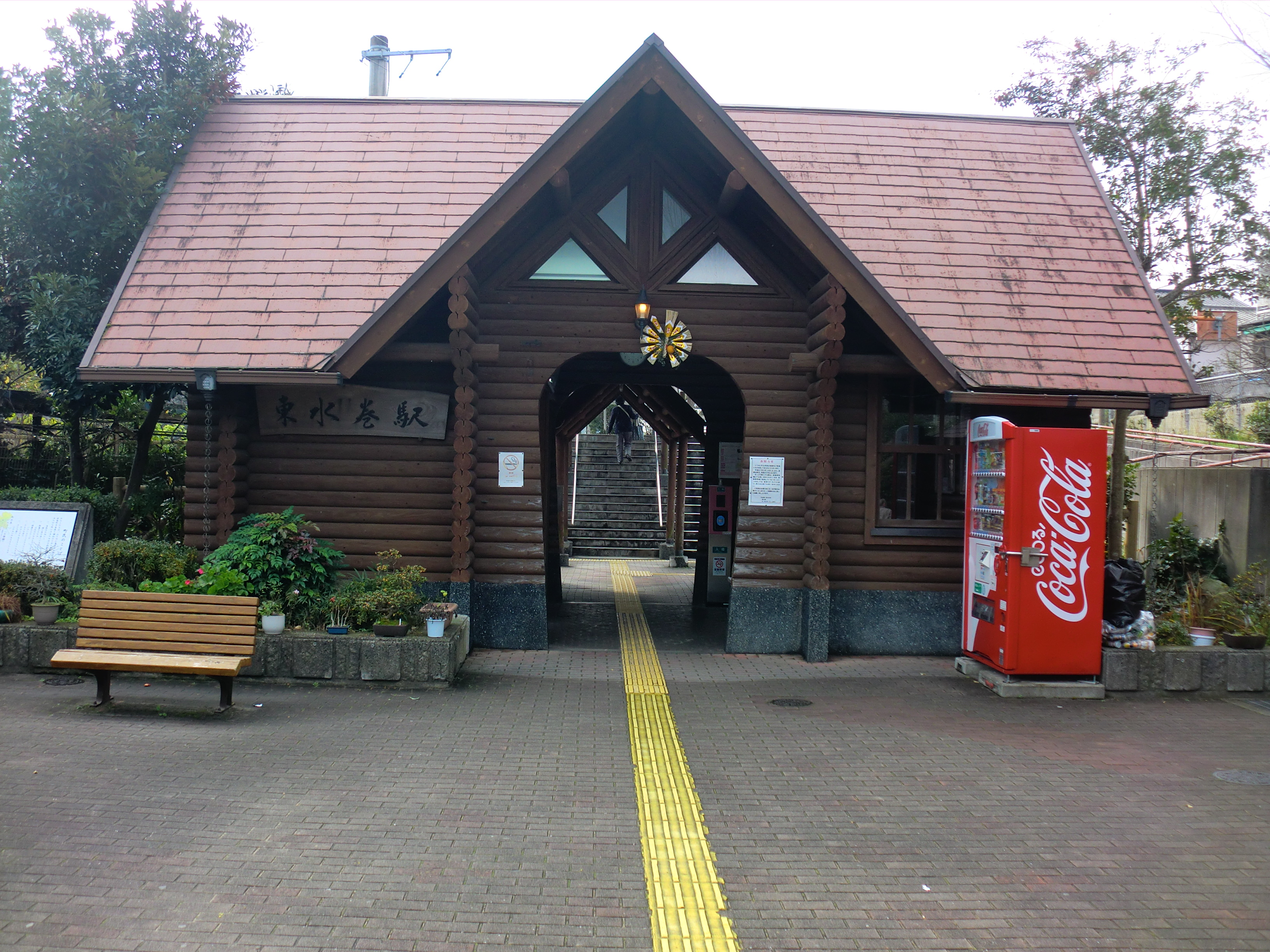 筑豊本線東水巻駅